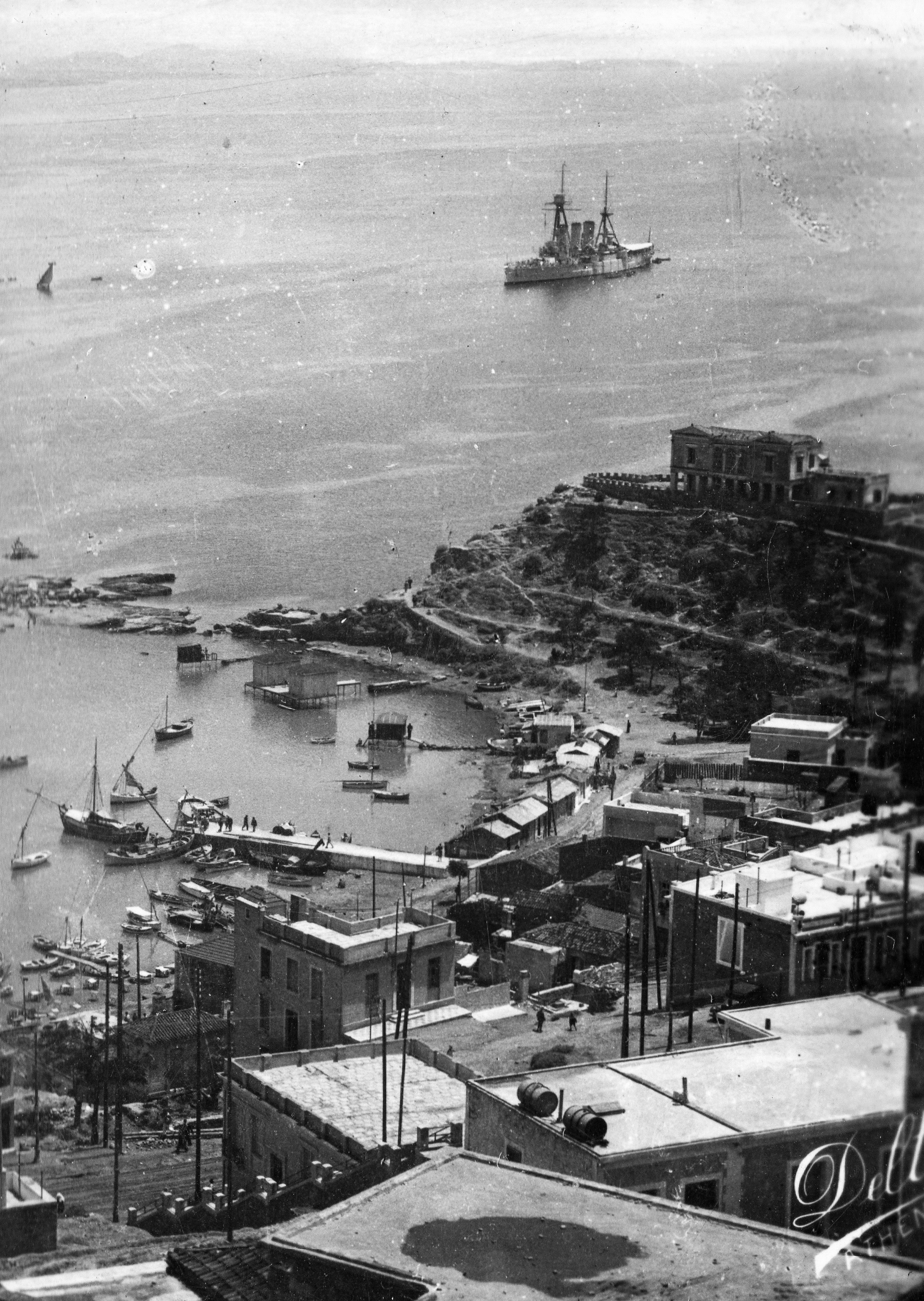 Pireusz, a Faliroi-öböl látképe az Illés próféta-dombról. Location: Greece, Athens Tags: port, ship, warship, picture Title: Pireusz, a Faliroi-öböl látképe az Illés próféta-dombról.